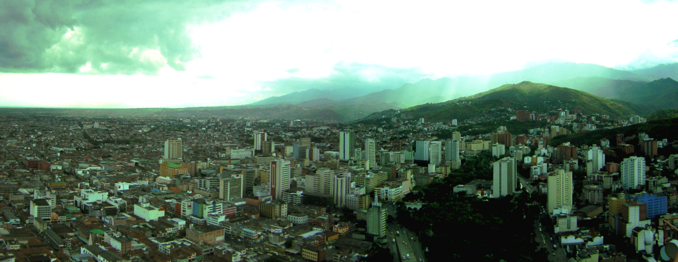 Santiago de Cali desde la Torre de Cali, al fondo se ve el cerro de Crito Rey